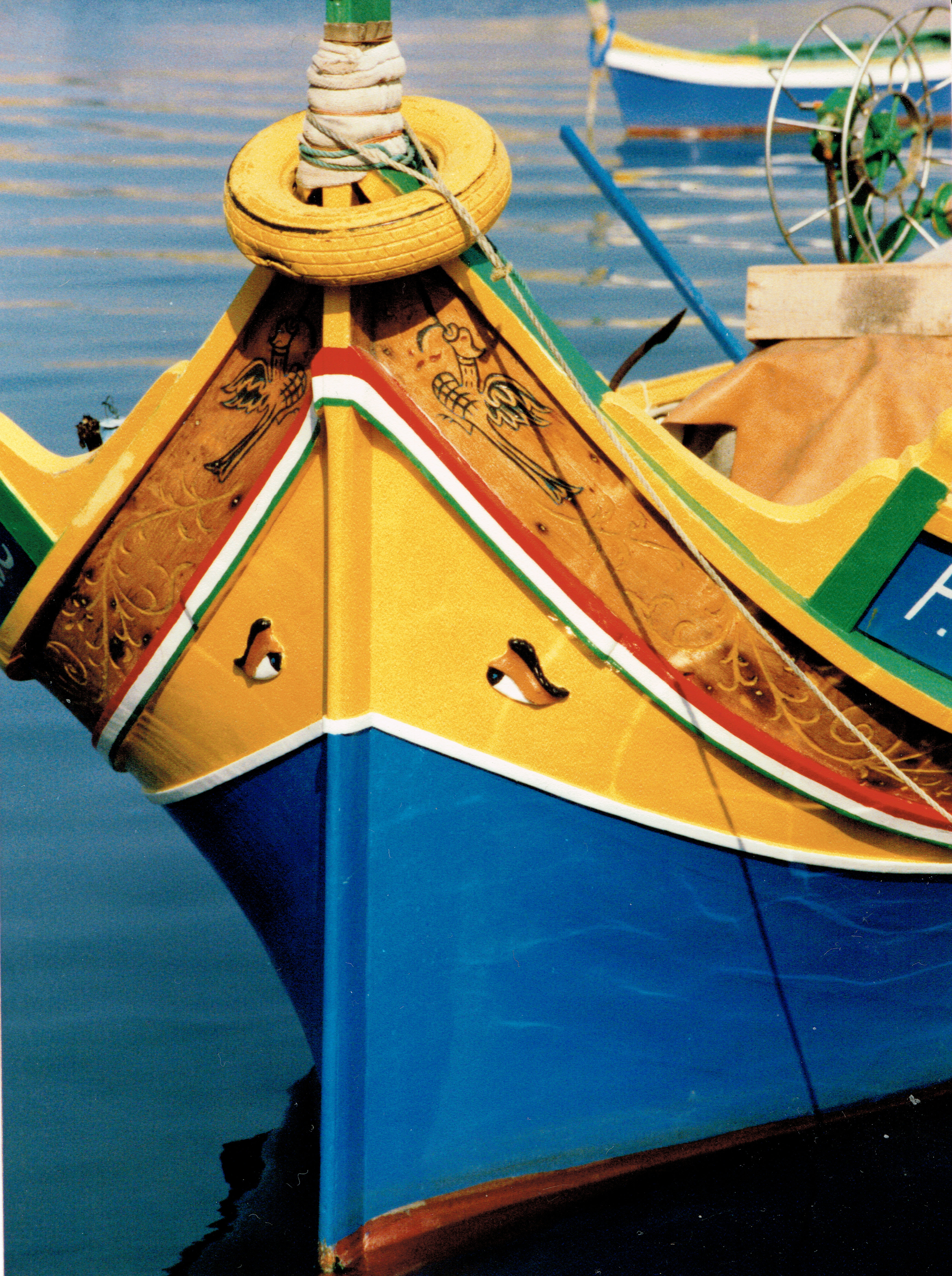 Typický maltský člun, tzv. luzzu (podobná jako dhajsa), foceno 1985 v přístavu Marsaxlokk, Malta A typical maltese boat called luzzu (similar to dhajsa), photo taken 1985 in Marsaxlokk, Malta Typisches maltesisches Boot Luzzu (ähnlich wie Dhajsa), fotografiert 1985 in Marsaxlokk, Malta